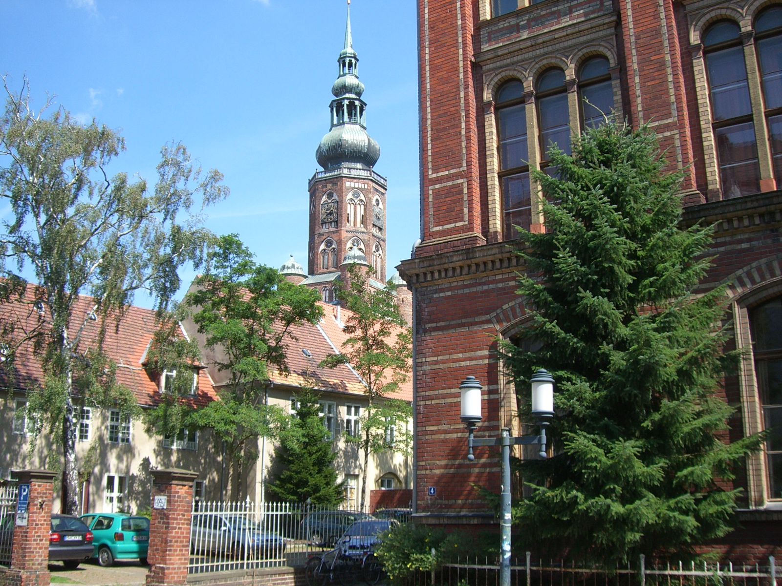 Greifswald